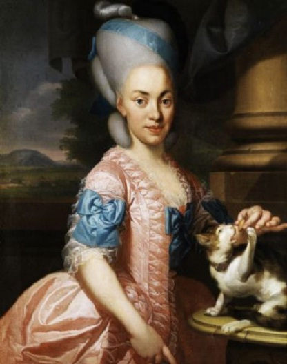 Portrait eines Nürnberger Edelfräuleins